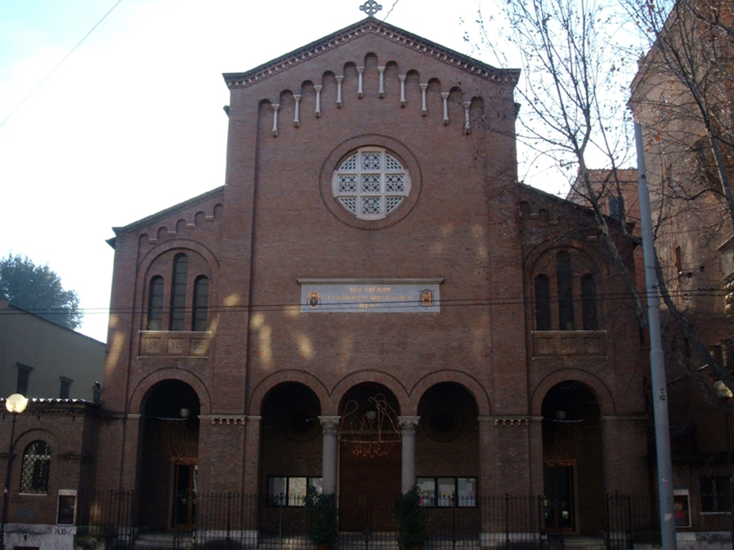 Chiesa di San Giuseppe a via Nomentana, a Roma, nel quartiere Nomentano.